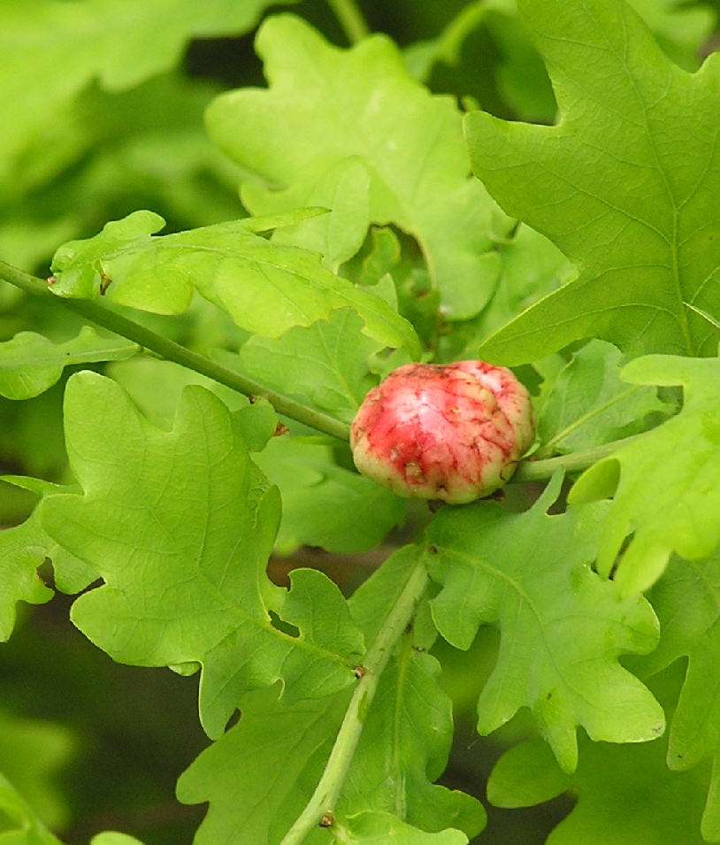 Galle von Biorhiza pallida an einem Eichen-Blatt.